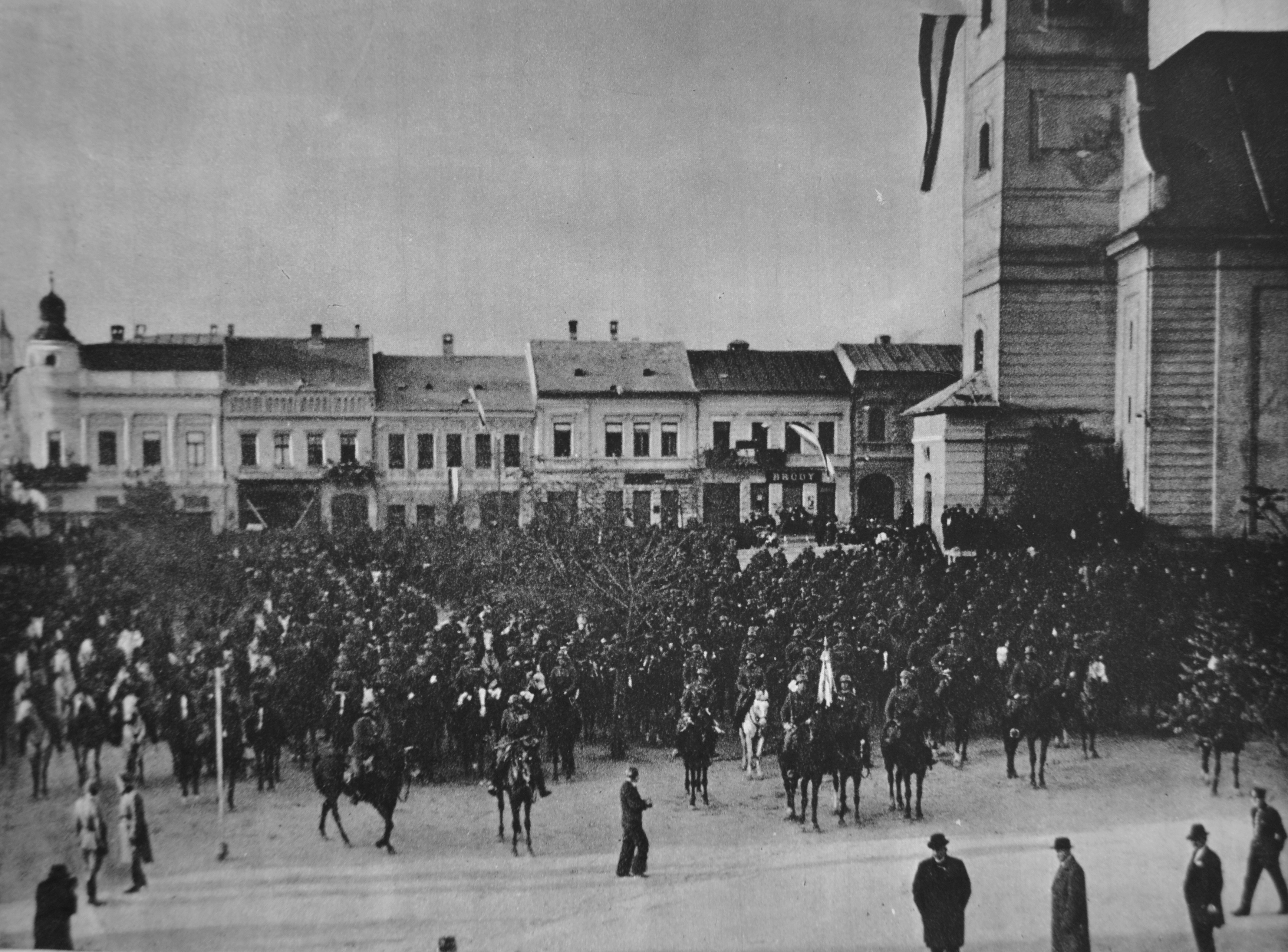 Po prvej viedenskej arbitráži, ktorá sa konala 2. novembra 1938, 10. novembra pripadla Rimavská Sobota Maďarsku (pohľad na Hlavné nám.)